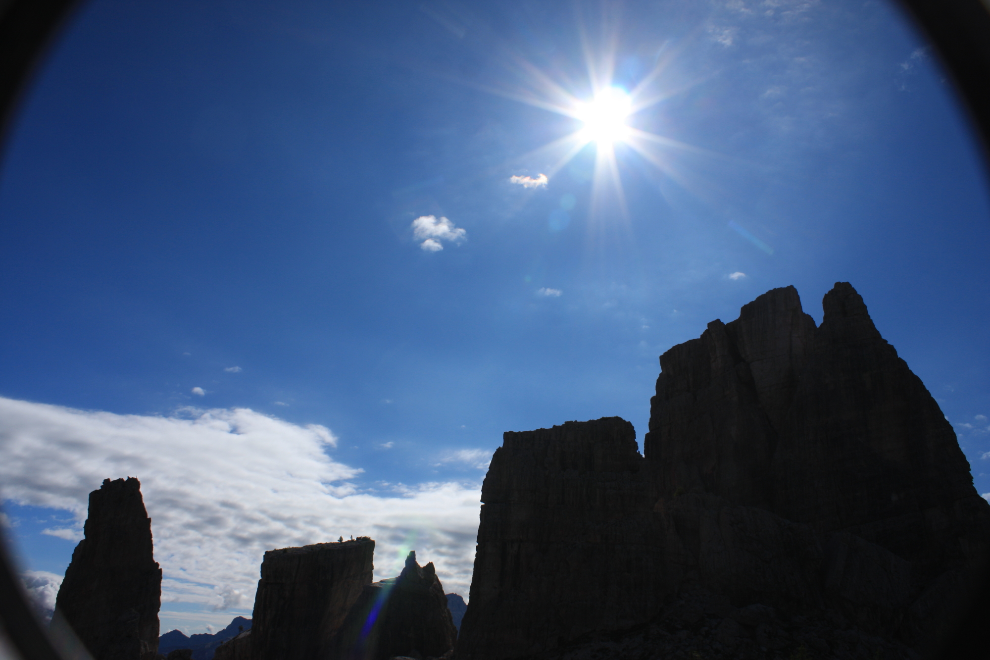 Die Cinque Torri vom Freilichtmuseum aus fotografiert.